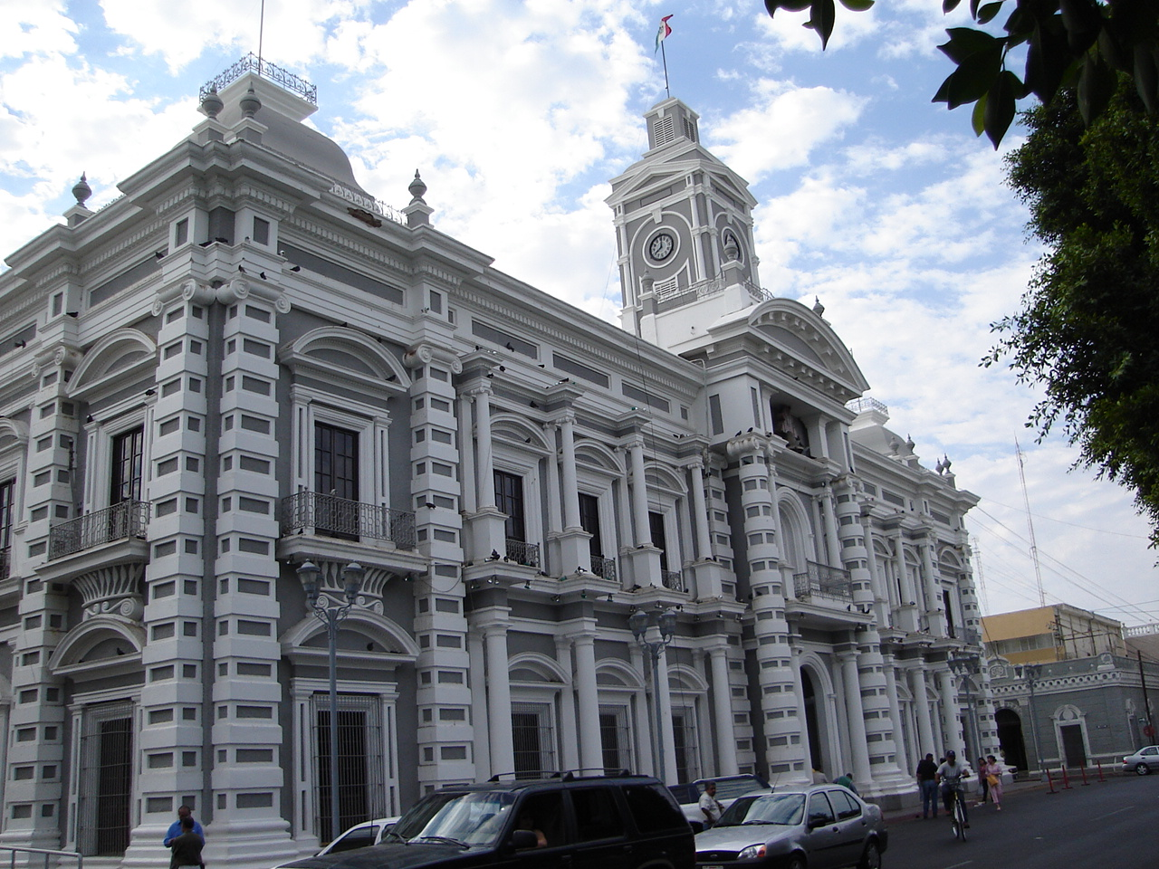 Palacio de Gobierno del Estado de Sonora en Hermosillo su capital.